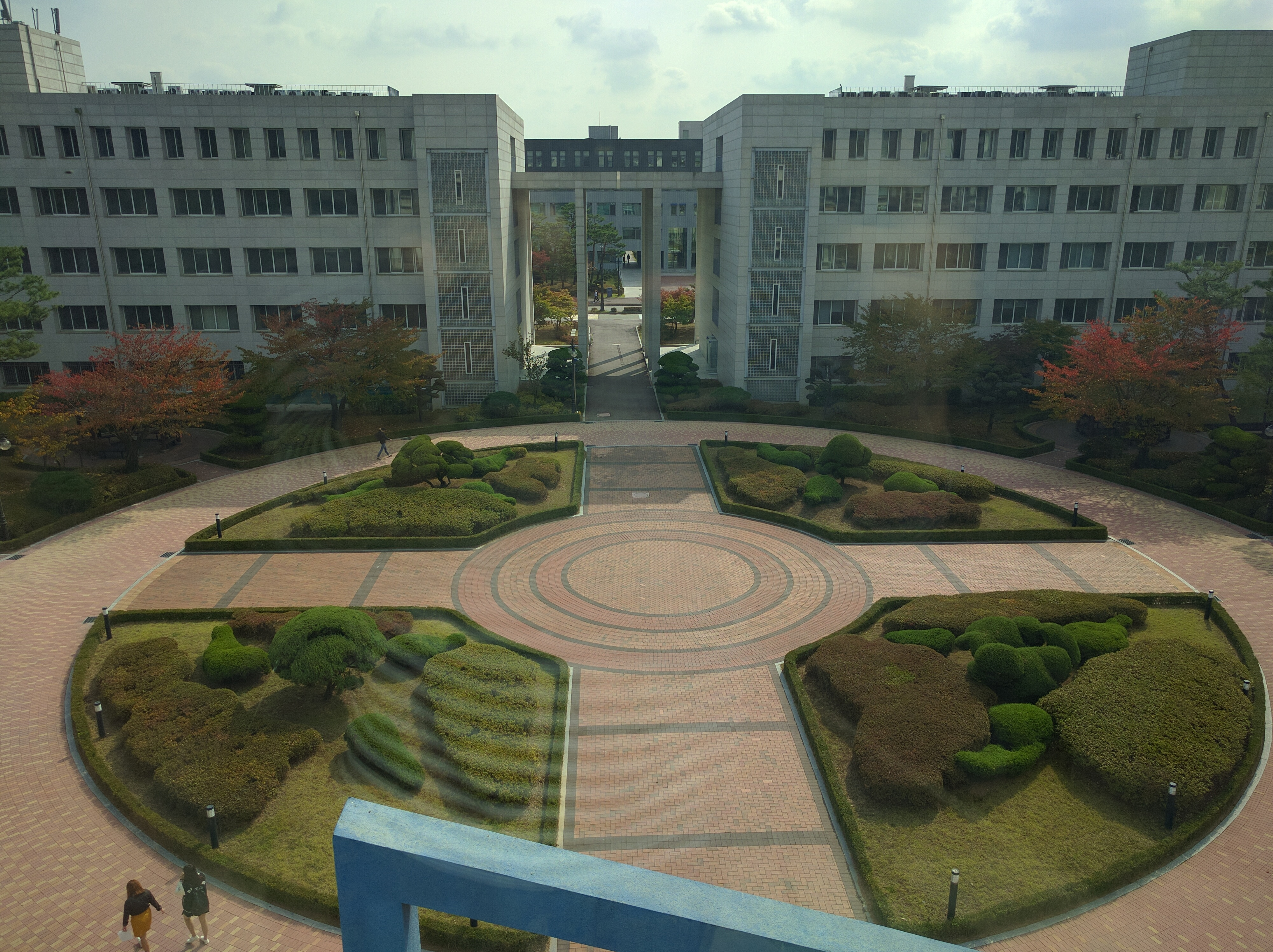 한양대학교 ERICA캠퍼스 언정대 앞 정언마당